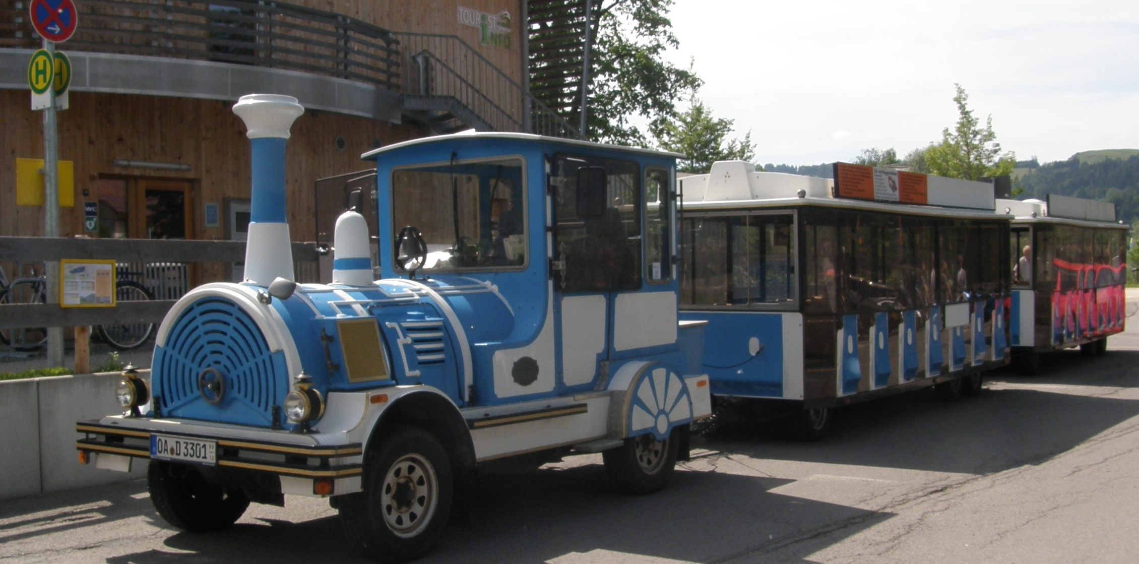 Das Immenstädter Alpseebähnle vor dem Alpseehaus im Ortsteil Bühl - Tschu Tschu: Zugwagen T120/T170 mit zwei Anhängern Waggon Super Jumbo mit je 32 - 40 Fahrgästplätzen, Zuglänge ca. 21 m, Breite 2,40: m, Höhe: 2,50 m, Wendekreis des Zuges 12,50 m